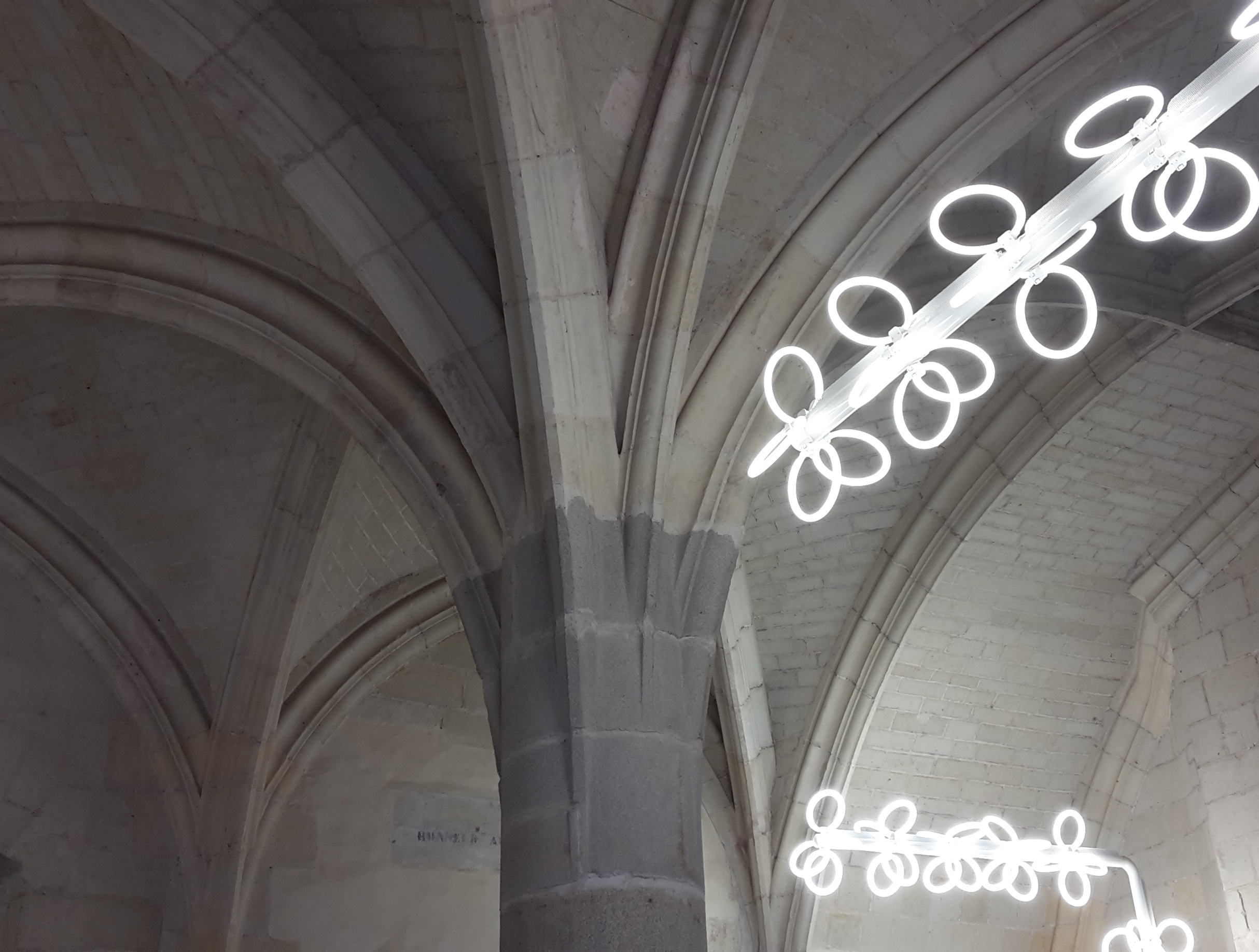 Voûte des anciennes cuisines du Grand Logis, Château des ducs de Bretagne, Nantes.